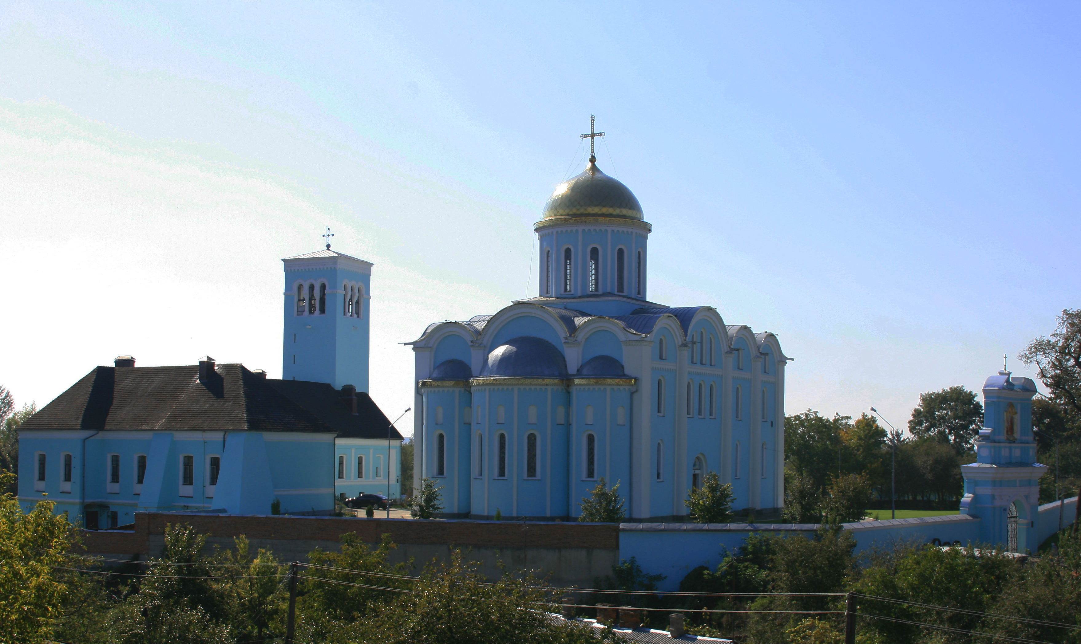 Кафедральный Успенский собор УПЦ МП во Владимире-Волынском